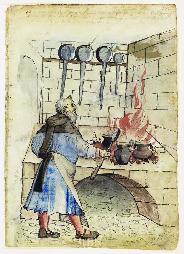 heinrich (Heinrich) schlichting(Schlichting) , koch (Koch) Transkription und weitere Informationen